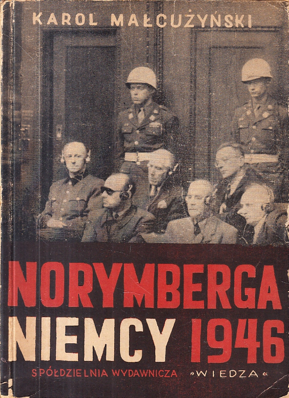 Karol Małcużyński Norymberga Niemcy 1946. Warszawa: Spółdzielnia Wydawnicza Wiedza, 1946